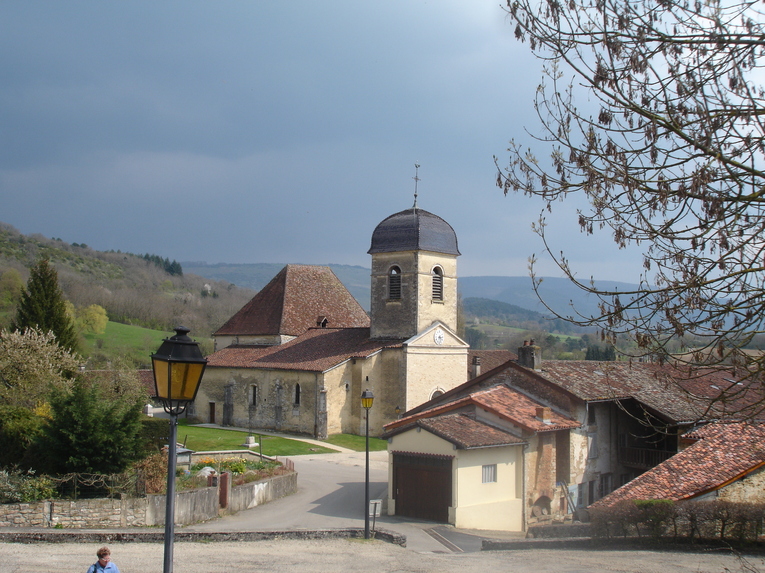 Verjon (Ain) : le haut du village